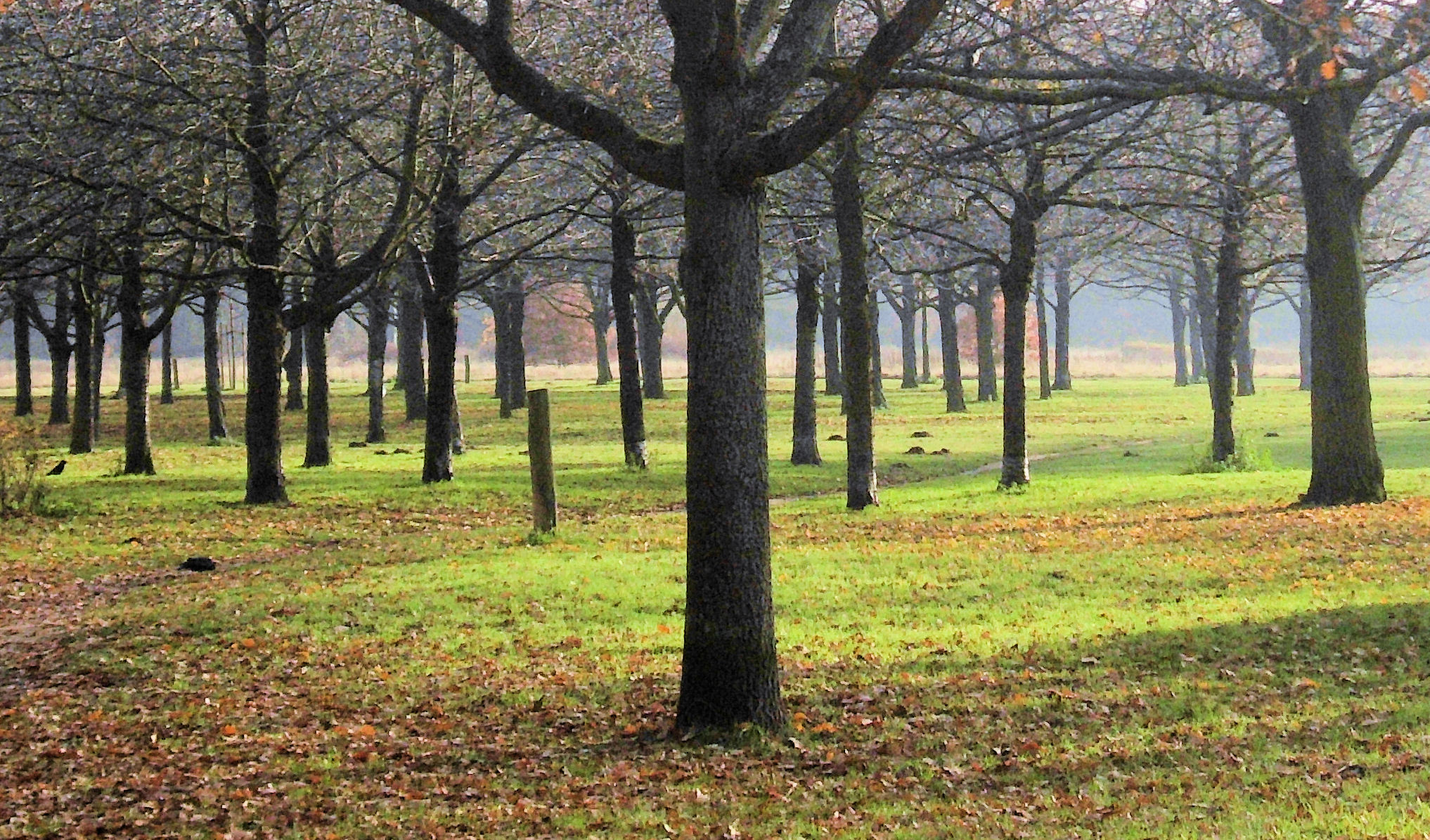 Hiroshima-Hain aus 110 Kirschbäumen im Herbst 2012 auf der Bult in Hannover. Die Bäume liefern zu jeder Jahreszeit eine andere eigentümliche Stimmung.